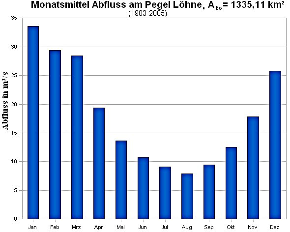 Monatsmittel des Abflusses der Werre am Pegel Löhne Quelle der Daten: Deutsches gewässerkundliches Jahrbuch 2005, Weser-Ems-Gebiet